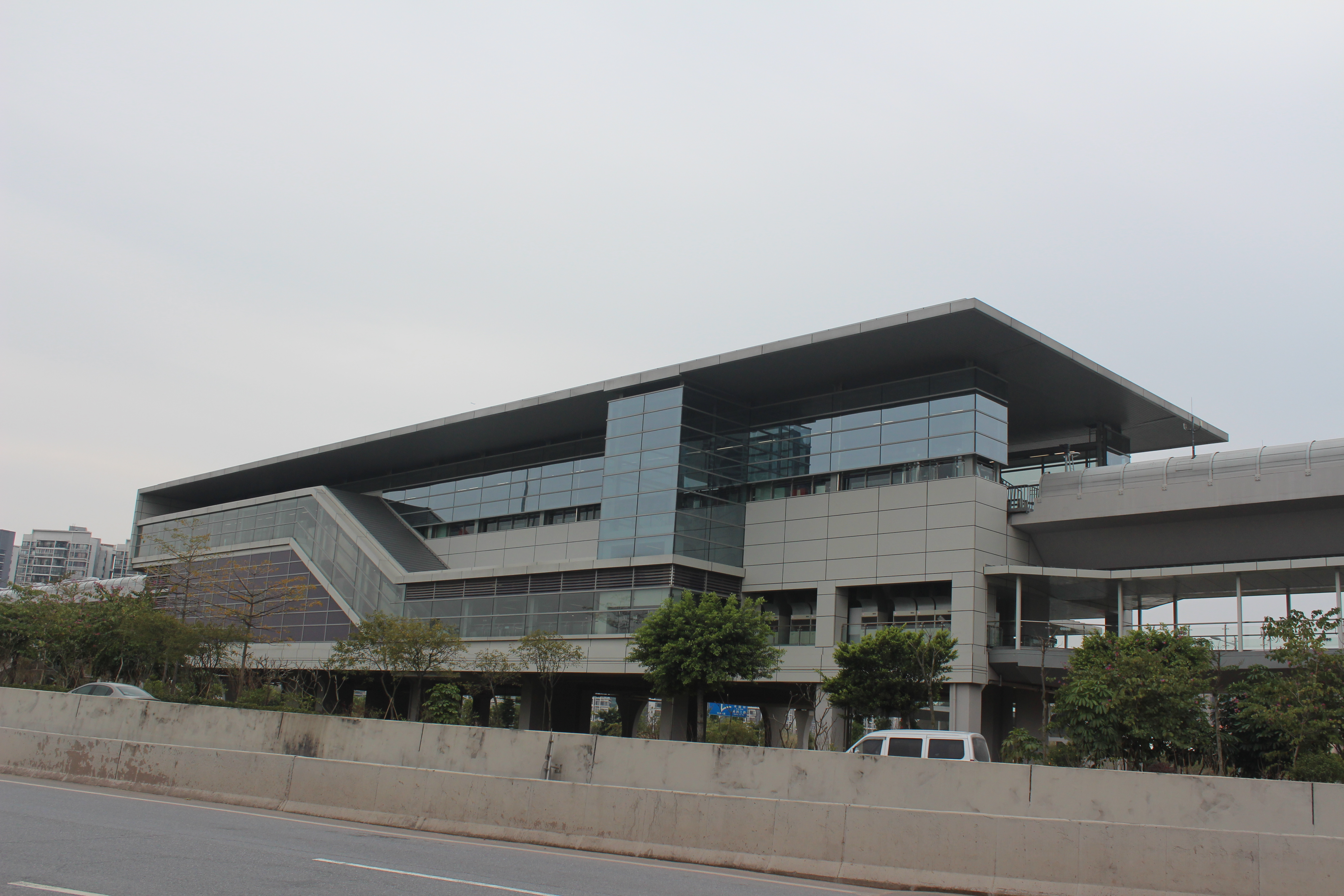 廣州地鐵6號線沙貝站車站外觀